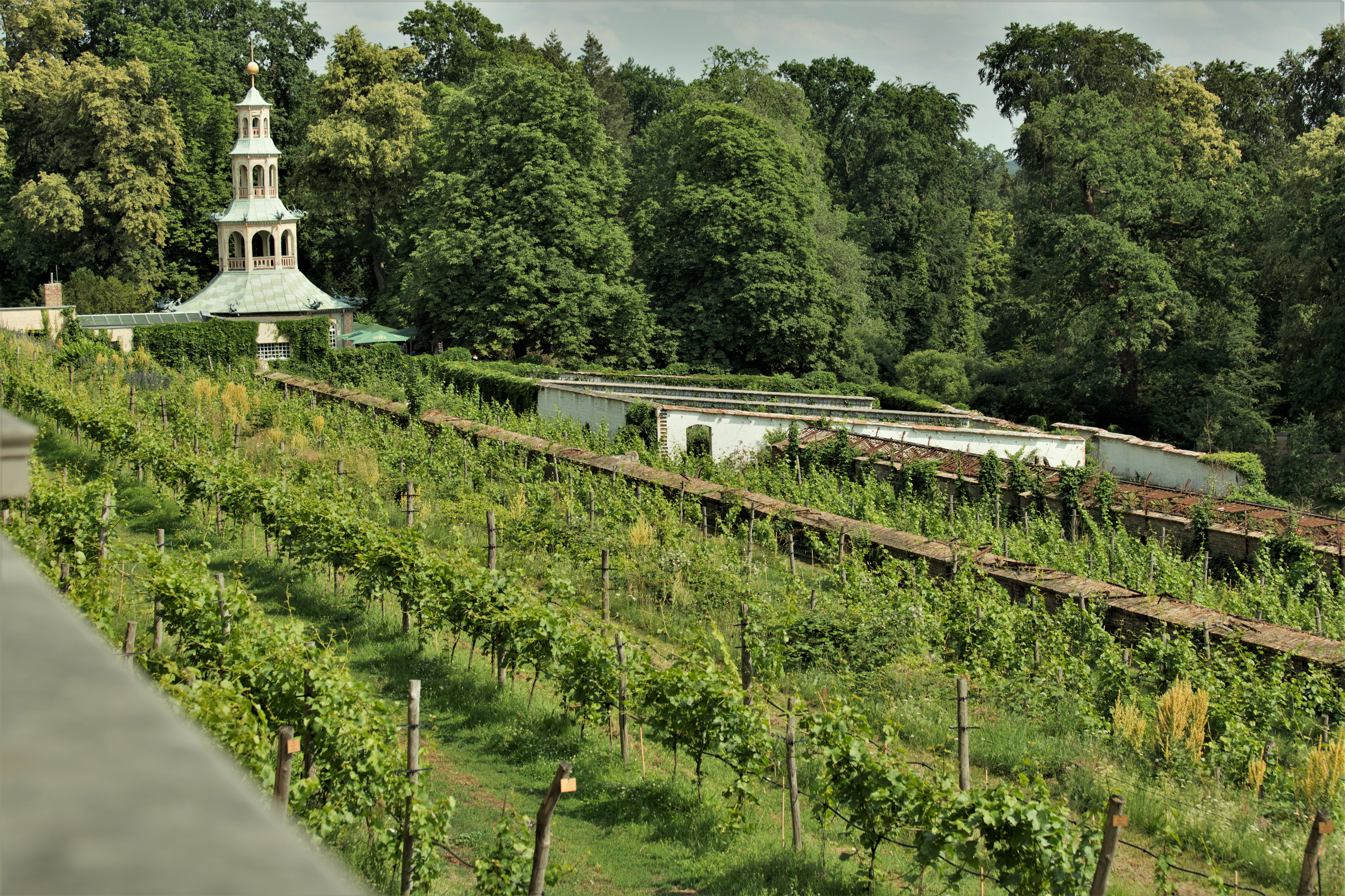 KulTour Parkanlage Sanssouci Weinberg Drachenhaus